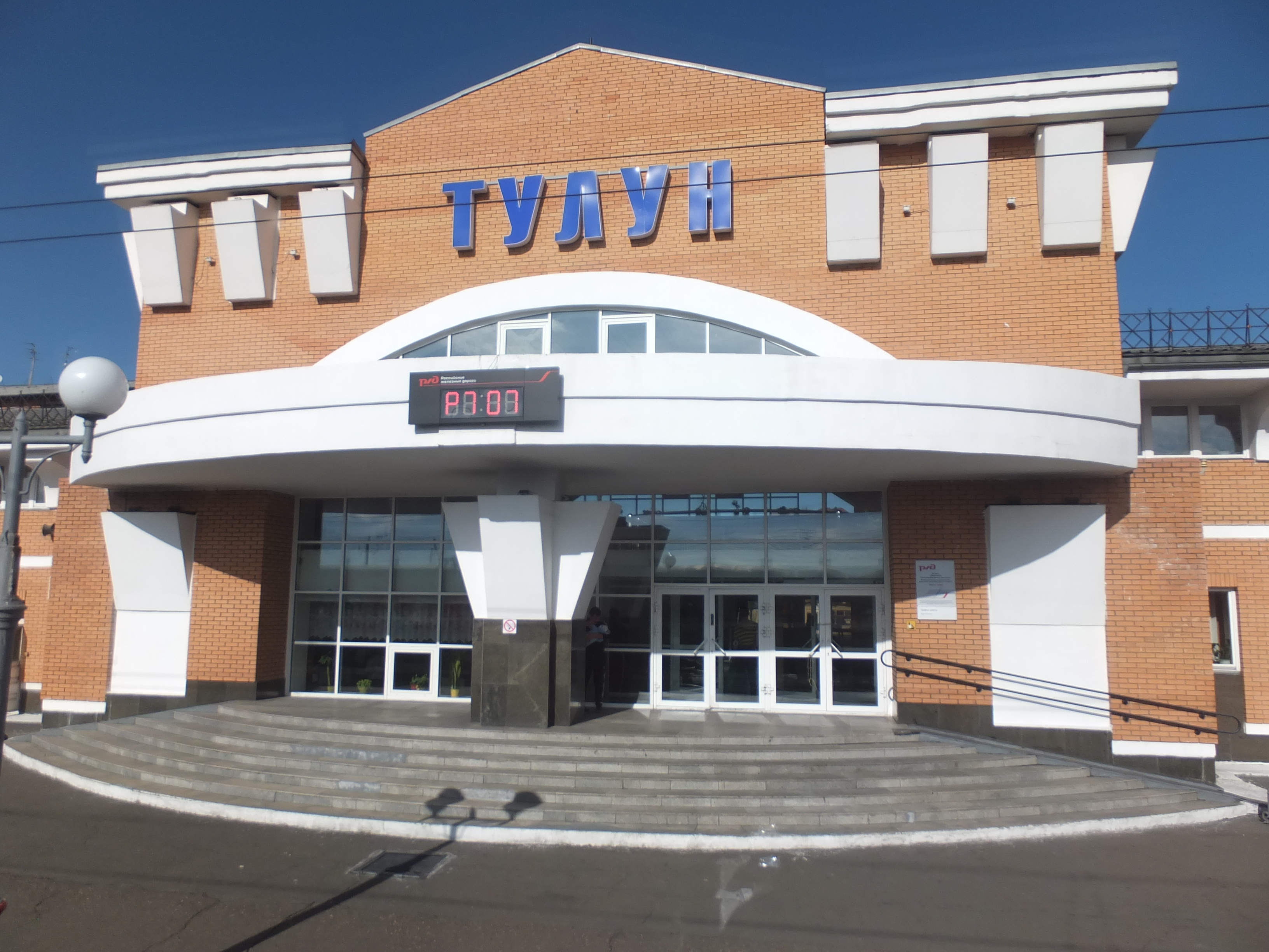 Bahnhof Tulun (Streckenkilometer 4714 der Transsibirischen Eisenbahn)